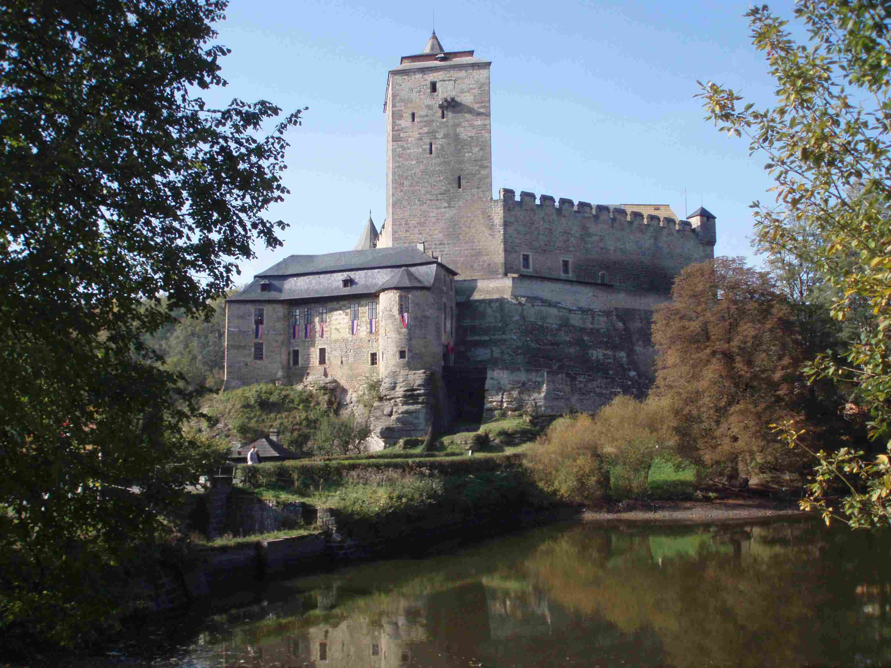 Hrad Kost